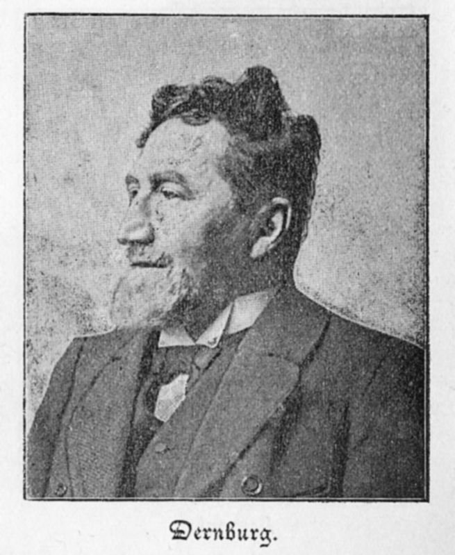 Friedrich Dernburg als Heidelberger Rhenane